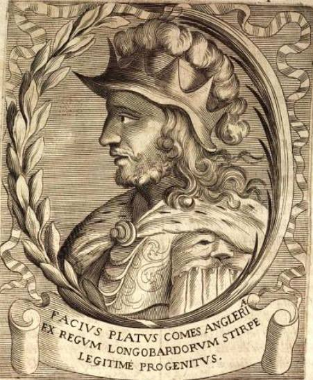 Retrato de Facio Platoni